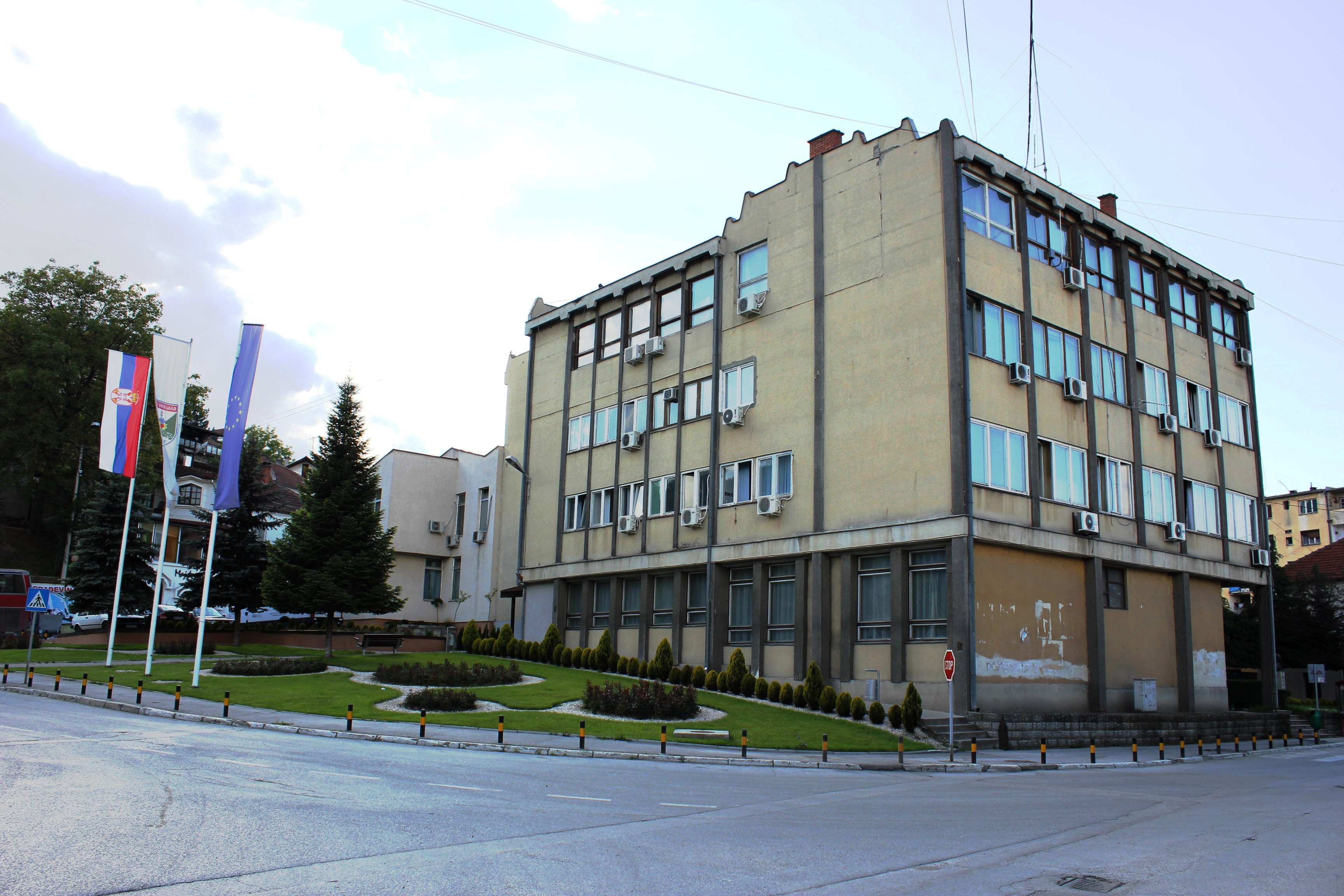 Сградата на общината в град Владичин хан, Сърбия.